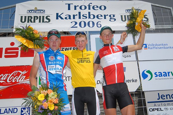 Die ersten drei der Trofeo 2006